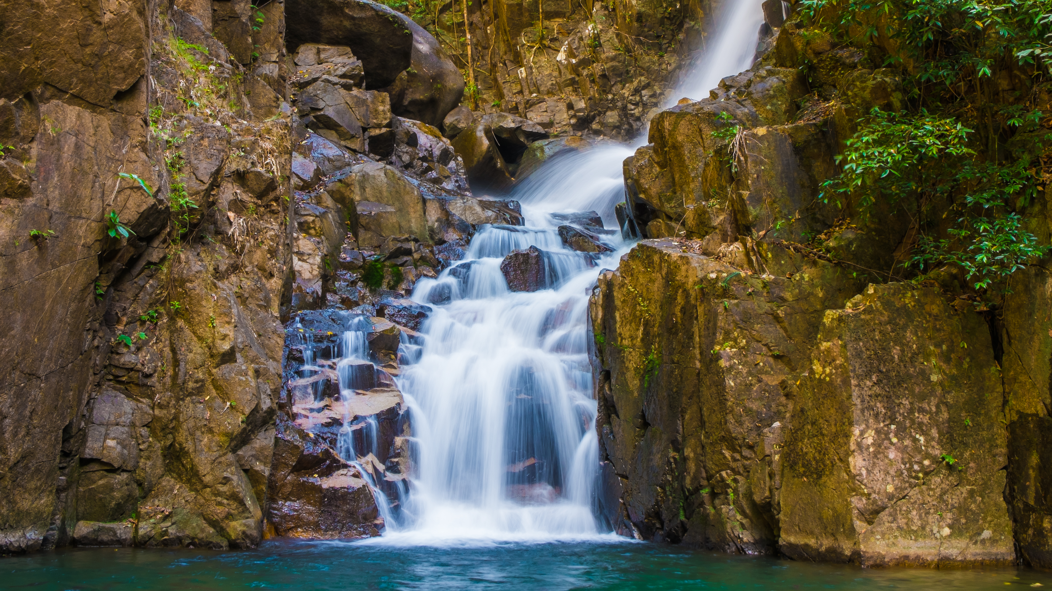 สายน้ำที่ไหลลงมาตามหินผา ที่อุทยานแห่งชาติน้ำตกพลิ้ว